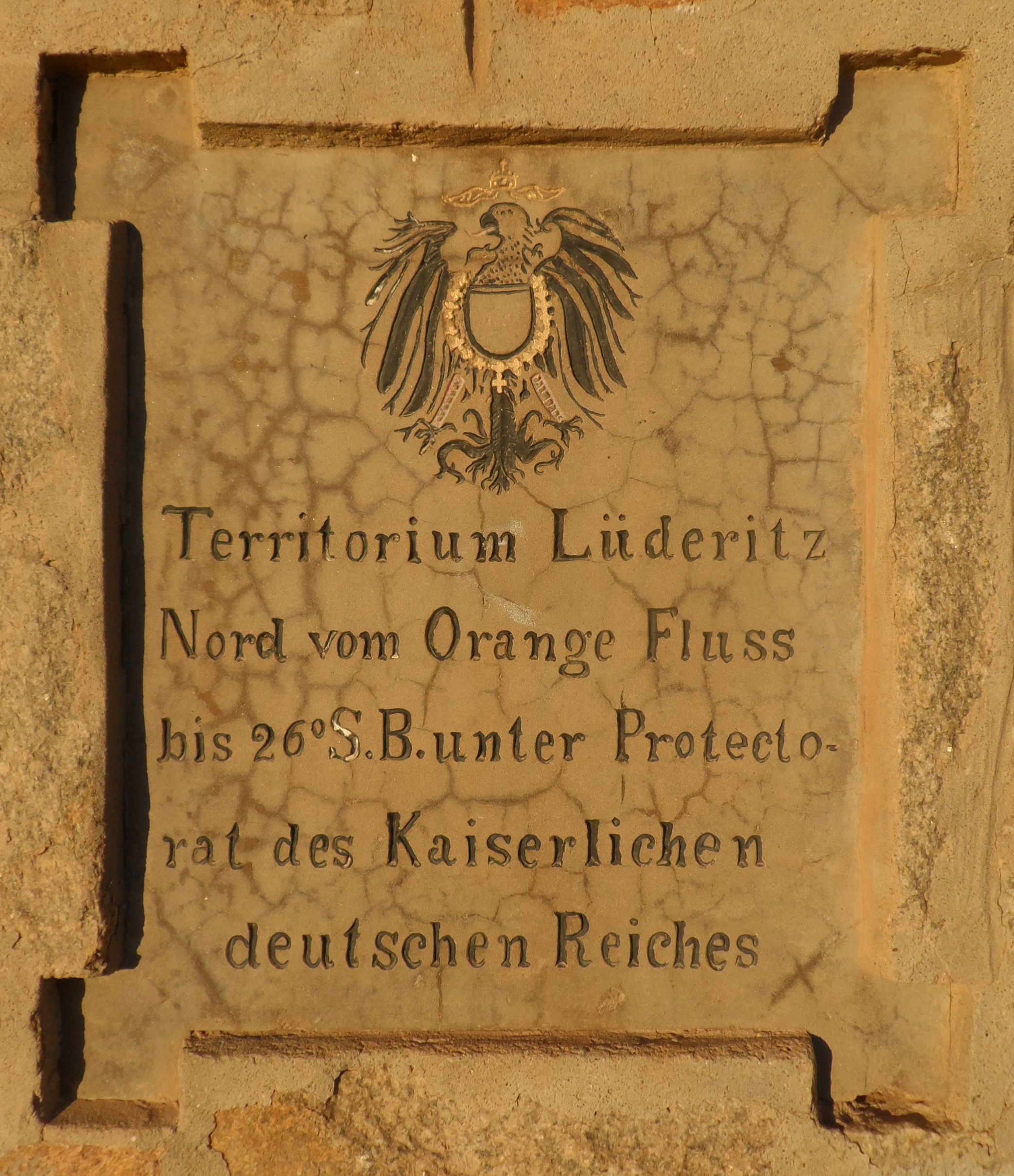 Lüderitz-Territorium-Denkmal in Lüderitz, Namibia, am nördlichen Ende der Industrie Straße, östlich von der Lüderitz Bay Cannery. Das früher auf dem Nautilus-Friedhof befindliche Denkmal (Lüderitz memorial) wurde am 15.3.1969 zum Nationaldenkmal erklärt. Da der Friedhof im Jahr 1977 aufgegeben wurde, wurde dieses Denkmal an die heutige Stelle vverlagert und zusammen mit 5m umgebenden Landes am 10.6.1980 erneut zum Nationaldenkmal erklärt.